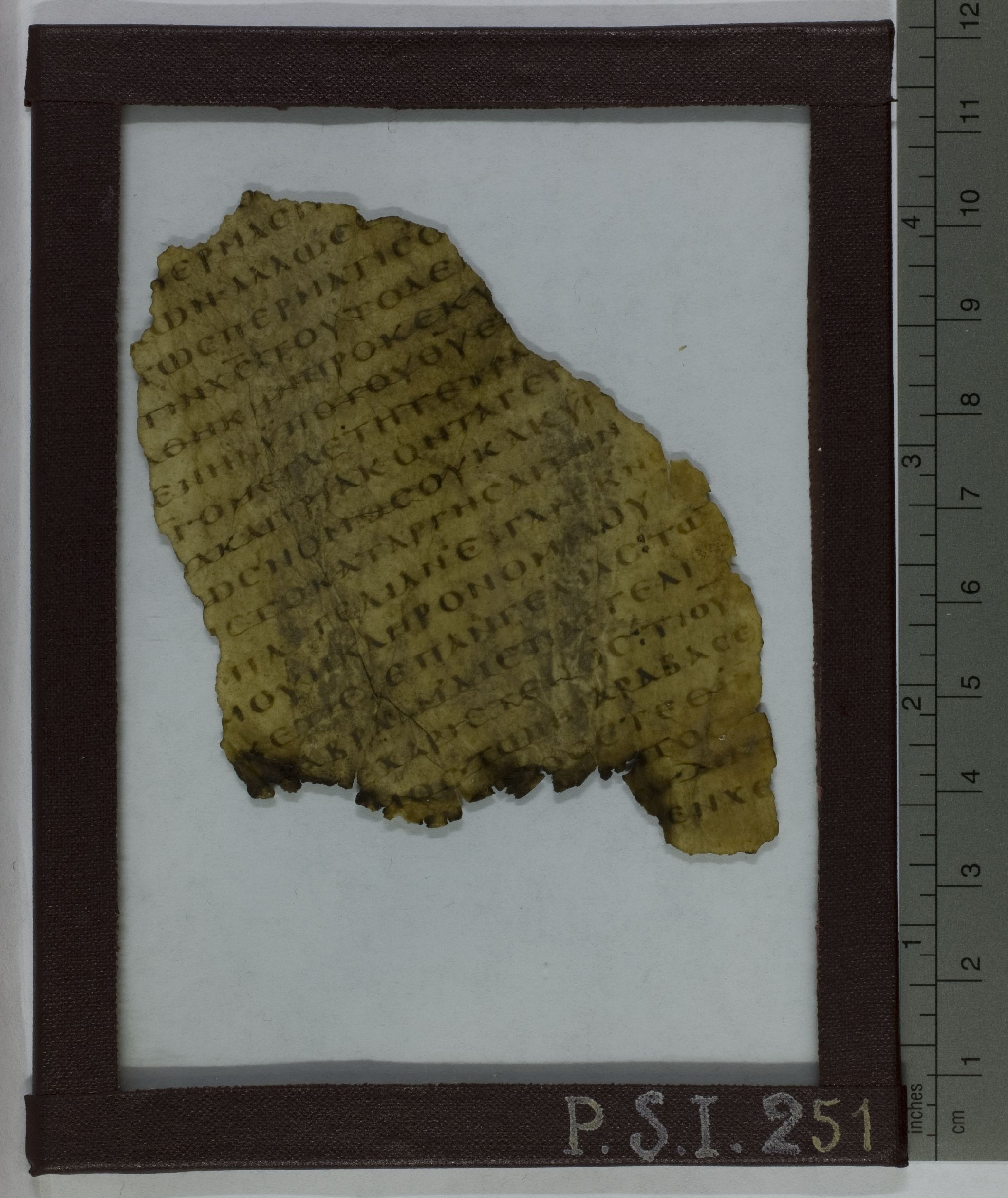 fragment of Uncial 0176 with the text of Galatians 3:16 ff